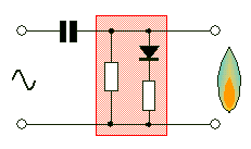 Principe van ionisatiedetectie van een (gas)vlam